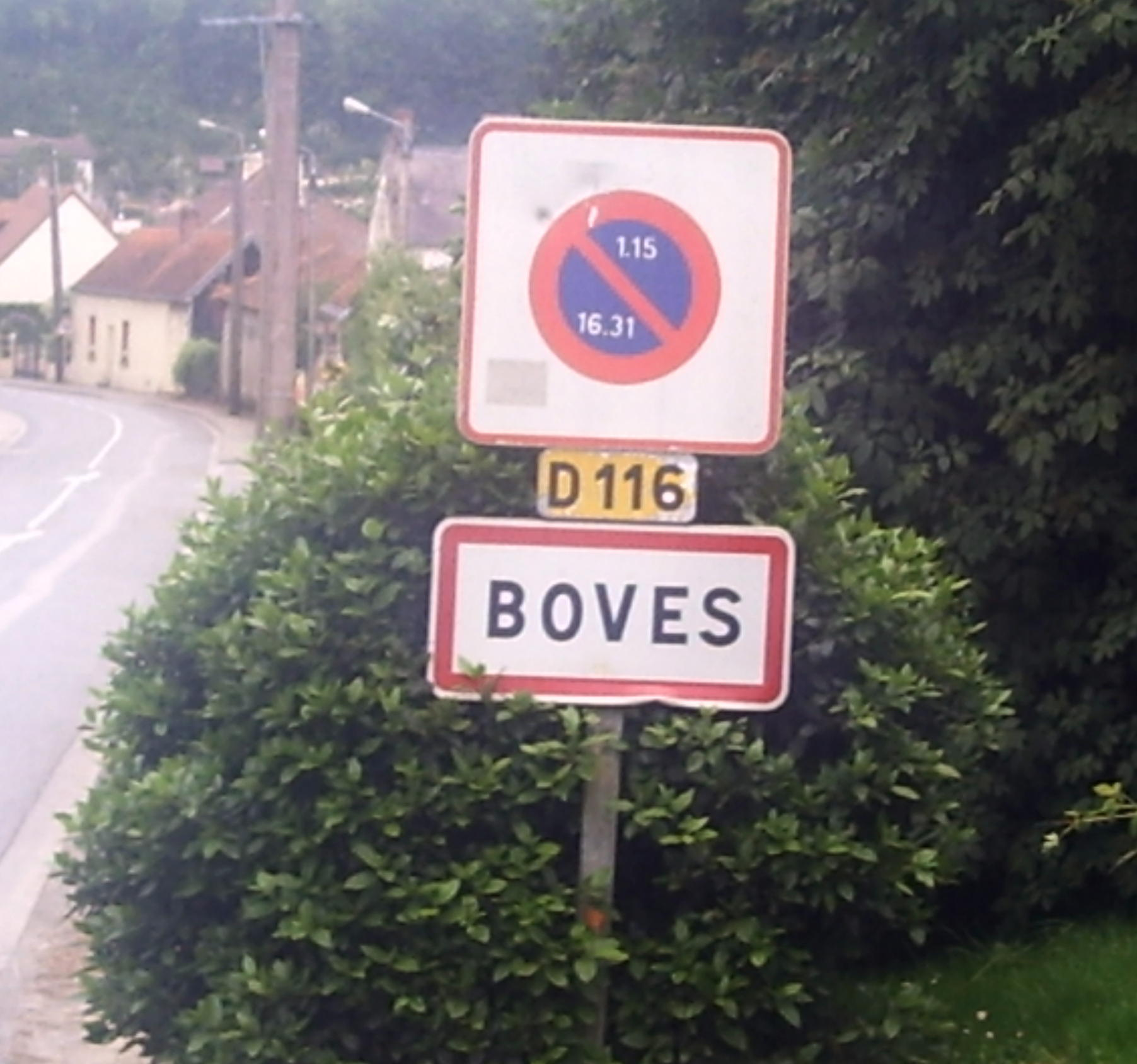 Boves (Somme, France) - Panneau à l'entrée de la localité, par la route d'Amiens (en pente). Les vestiges du château fort (invisibles ici) se trouvent en hauteur, sur la droite.